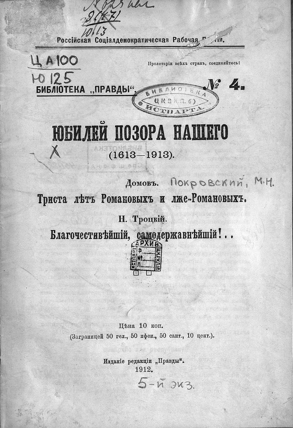 Юбилей позора нашего (1613-1913). - [Б. м.], 1912. - 27 с. - (Библиотека "Правды" ; № 4). - Содерж. : Триста лет Романовых и лже-Романовых / Домов ; Благочестивейший, самодержавнейший! / Н. Троцкий.